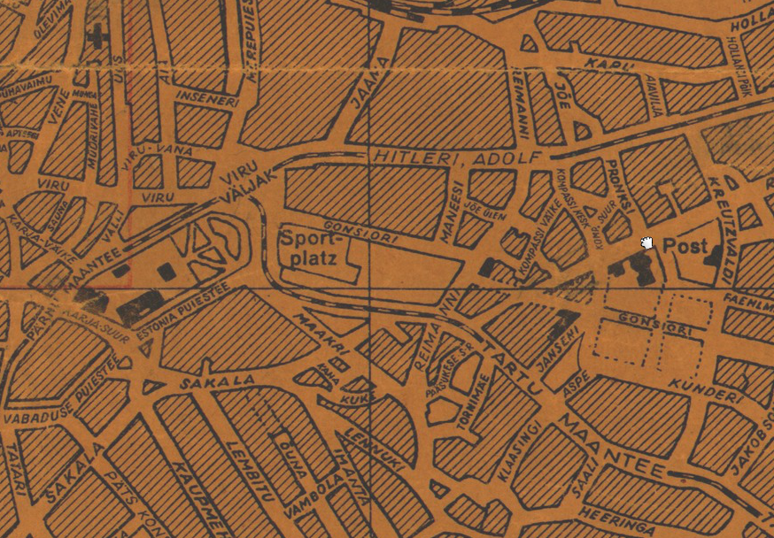 Kalevi spordiplats 1942 tallinna kaardil